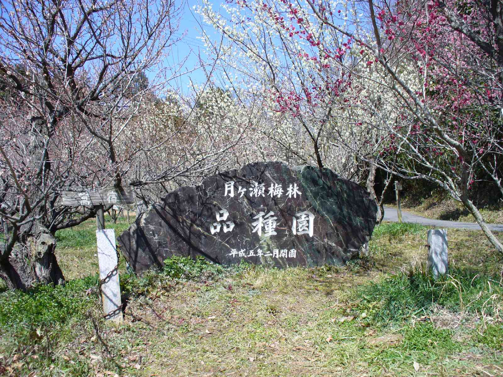 Plum-blossoms in Tuskigase-oyama, Nara-shi, Nara, Japan.